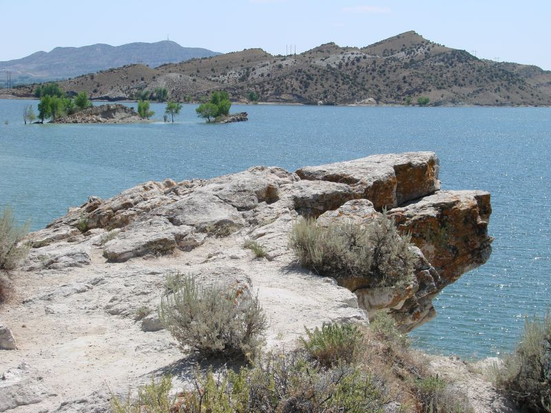 Steinaker Dam and Reservoir, Utah